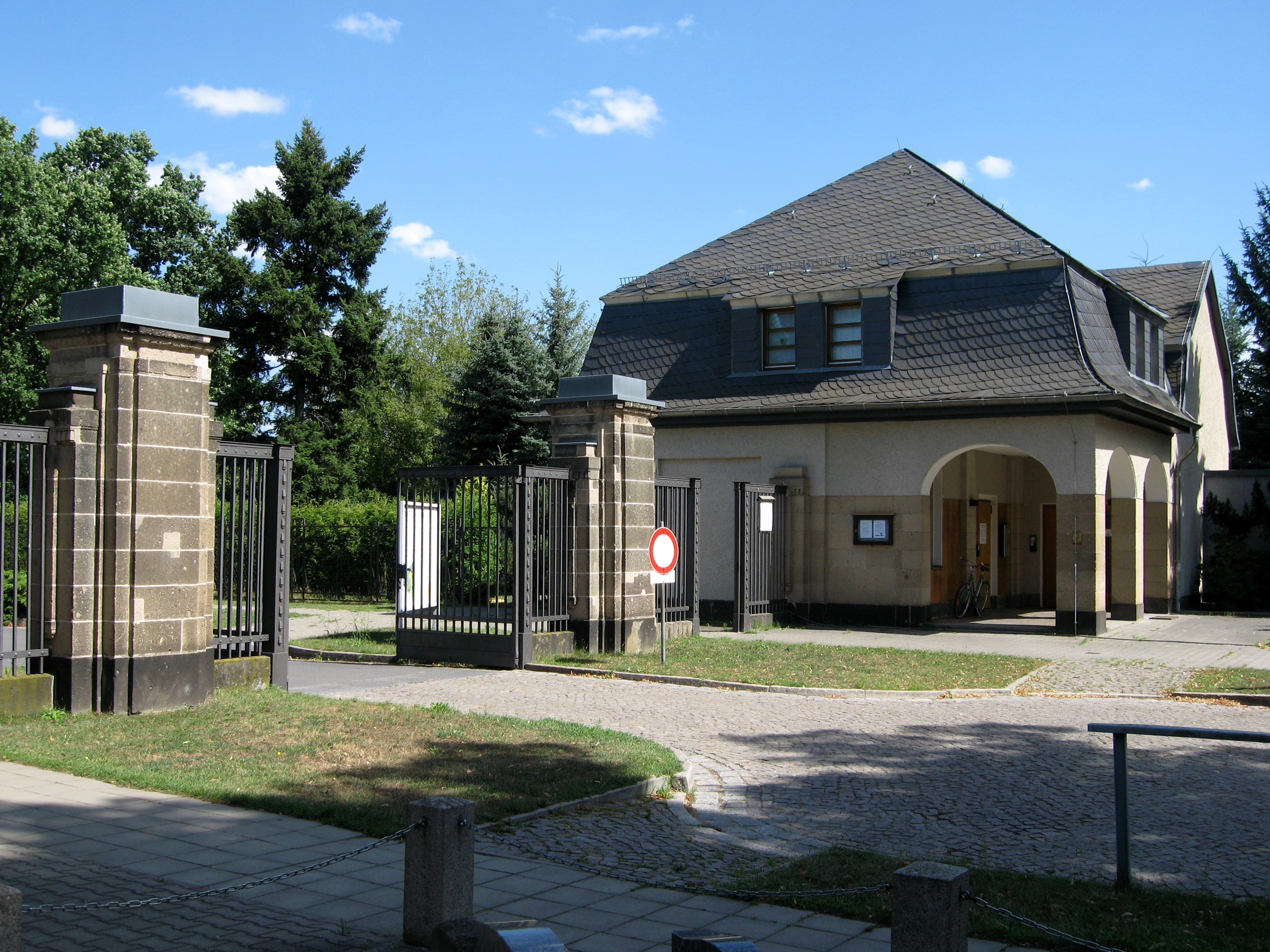 Tor und östliches Torhaus am Haupteingang des Ostkirchhofs Ahrensfelde, Landkreis Barnim, Land Brandenburg, Deutschland